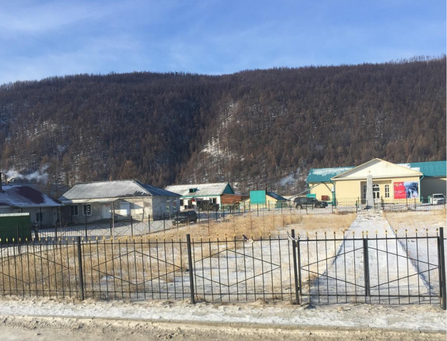 The village center Orlik